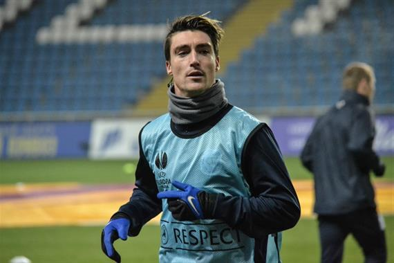 Сіто Рієра 30 листопада 2013 року під час матчу із загребським Динамо.